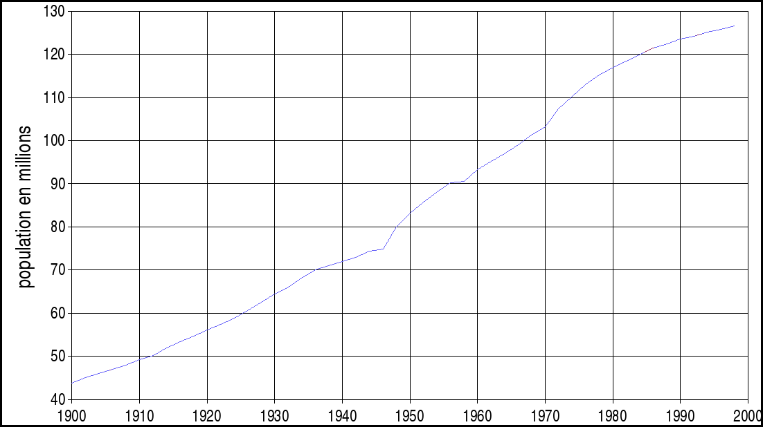 Description : Image réalisée avec OpenOffice. Source & réalisateur : Jérôme Paniel (Moi) Licence